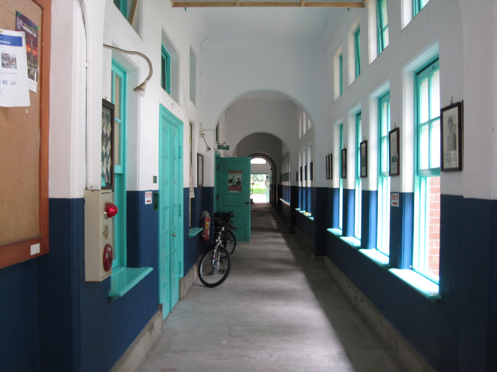 中文（台灣）: 成功大學物理系館走廊。